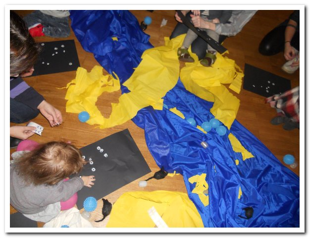 Loovustoa loovustund KUMU kunstimuuseumis